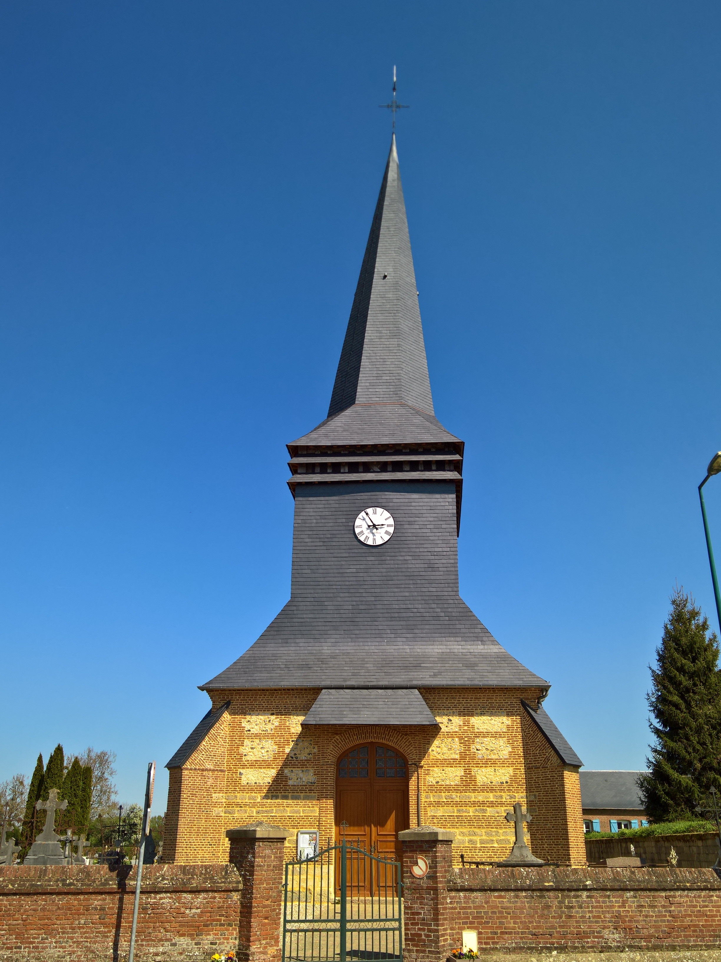 Conteville (76) : L'église Saint-Nicolas